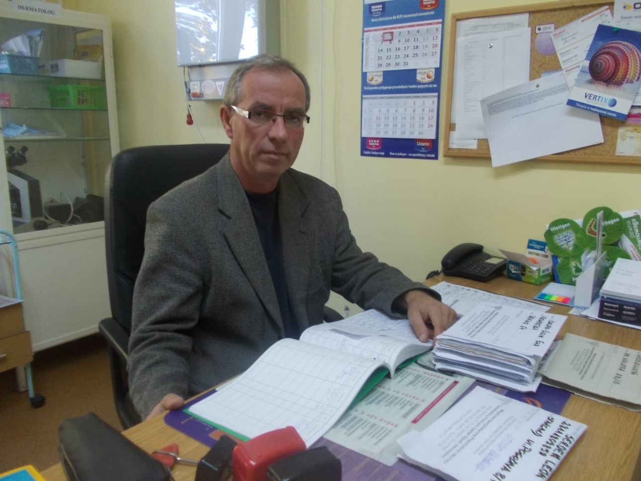 Stargard, 2013r. Były dowódca 12bm ppłk lek. Włodzimierz Kuta